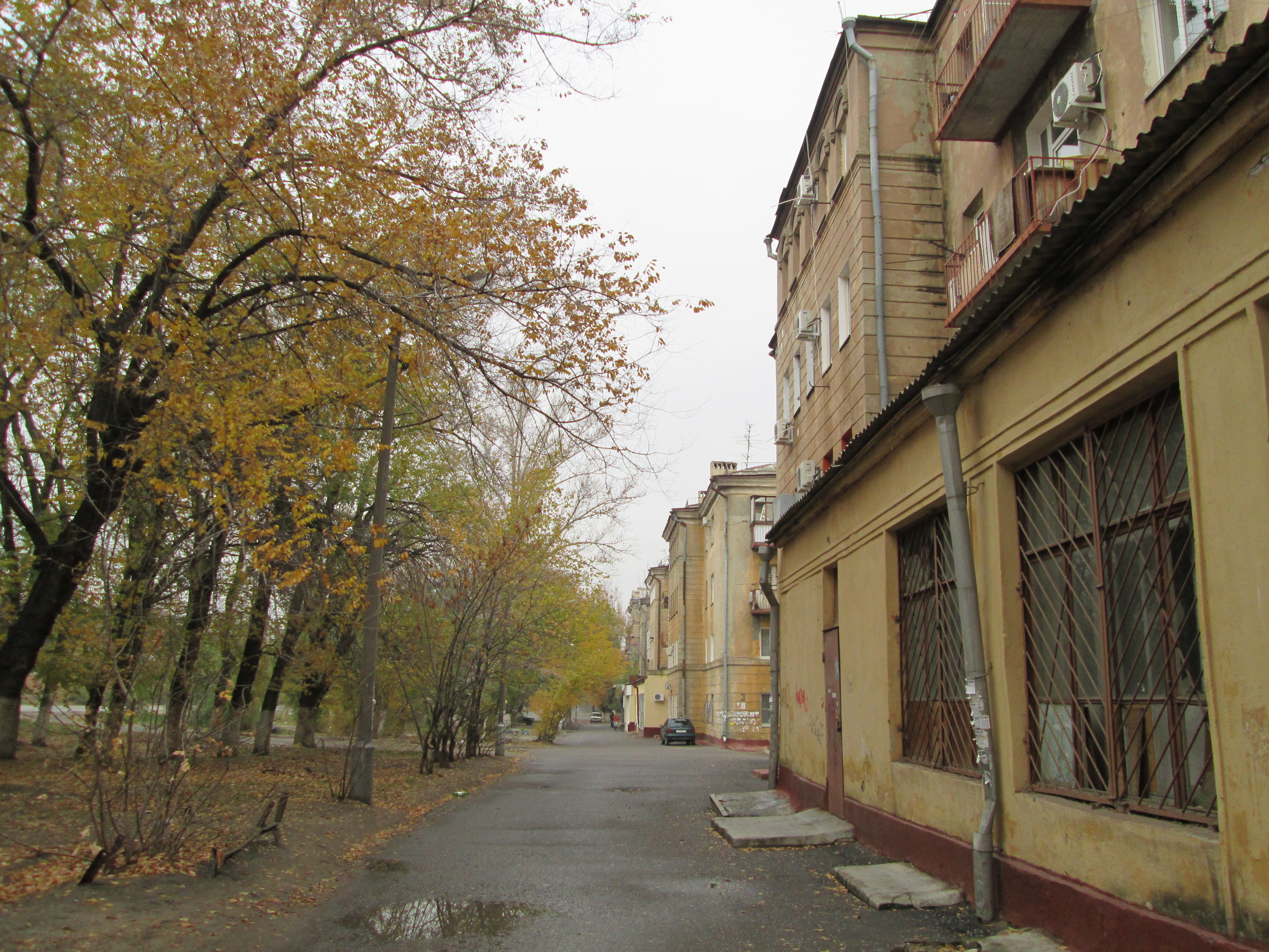 Посёлок Нижний, ул. Тракторостроителей